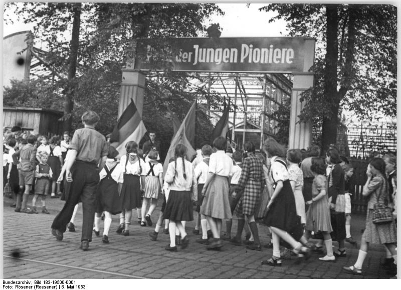 Zentralbild-Rösener Kno-Wi. 6.5.1953 Pionierpark in Magdeburg-Buckau eröffnet Die Sowjetische Kontrollkommission schenkte aus Liebe zu unserer Jugend den Thälmann-Pionieren Magdeburgs einen Pionierpark, der eine Pflegestätte der deutsch-sowjetischen Freundschaft sein wird. UBz, Eingang zum Pionierpark.